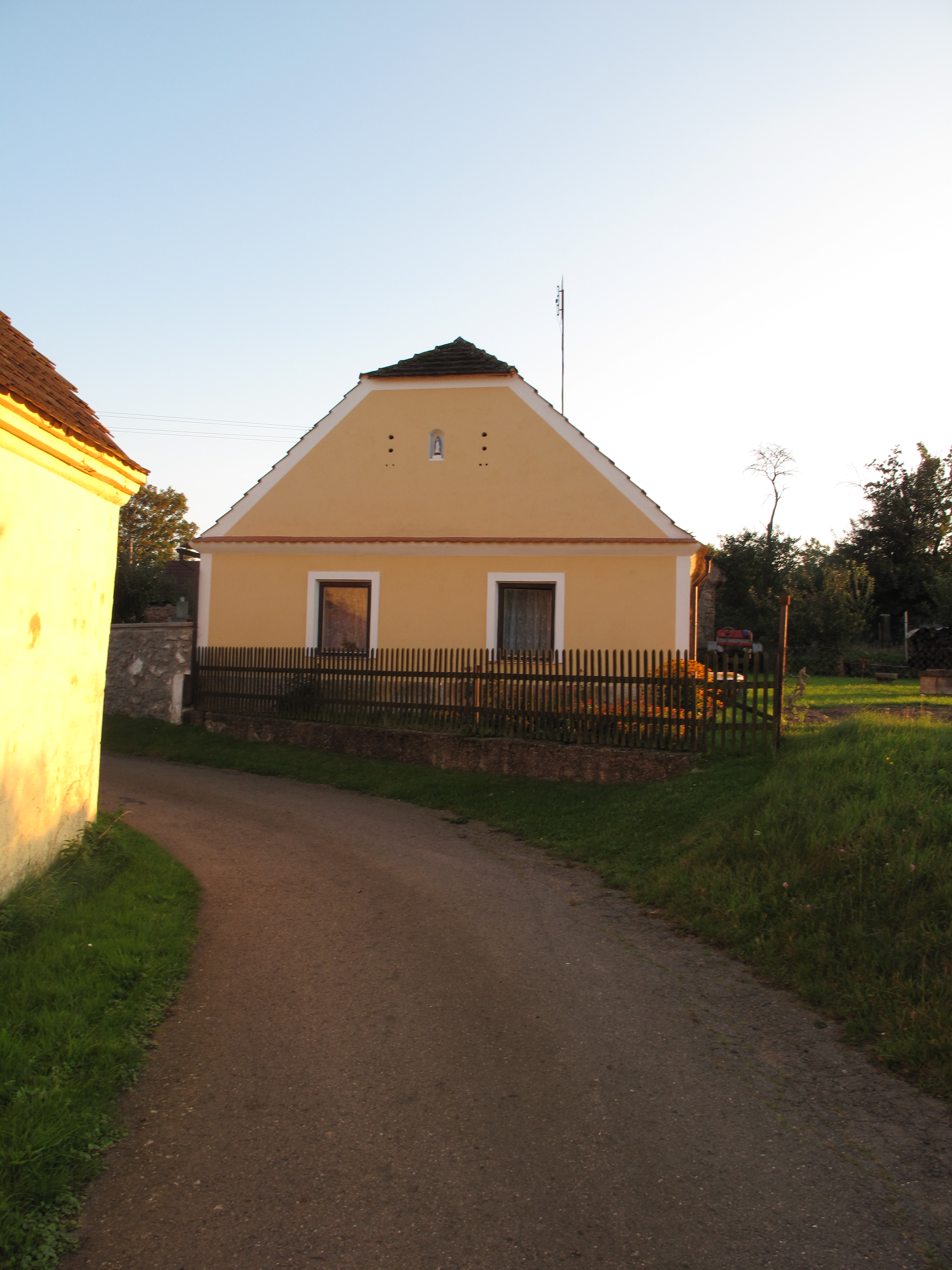 Žlutý dům v Laciné. Okres Strakonice, Česká republika.